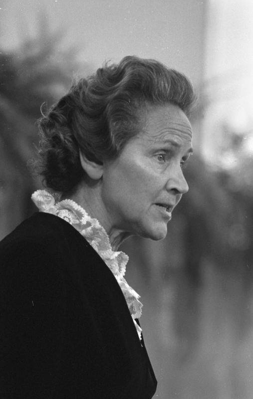 Marion Gräfin Dönhoff erhält Friedenspreis 1971 in der Frankfurter Paulskirche Frankfurt am Main. Friedenspreis des Deutschen Buchhandels. Verleihung an Marion Gräfin Dönhoff. Porträt Marion Gräfin Dönhoff Abgebildete Personen: Marion Gräfin Dönhoff, 1909-2002; Publizistin, Herausgeberin der Wochenzeitung Die Zeit, Bundesrepublik Deutschland (GND 118680056)